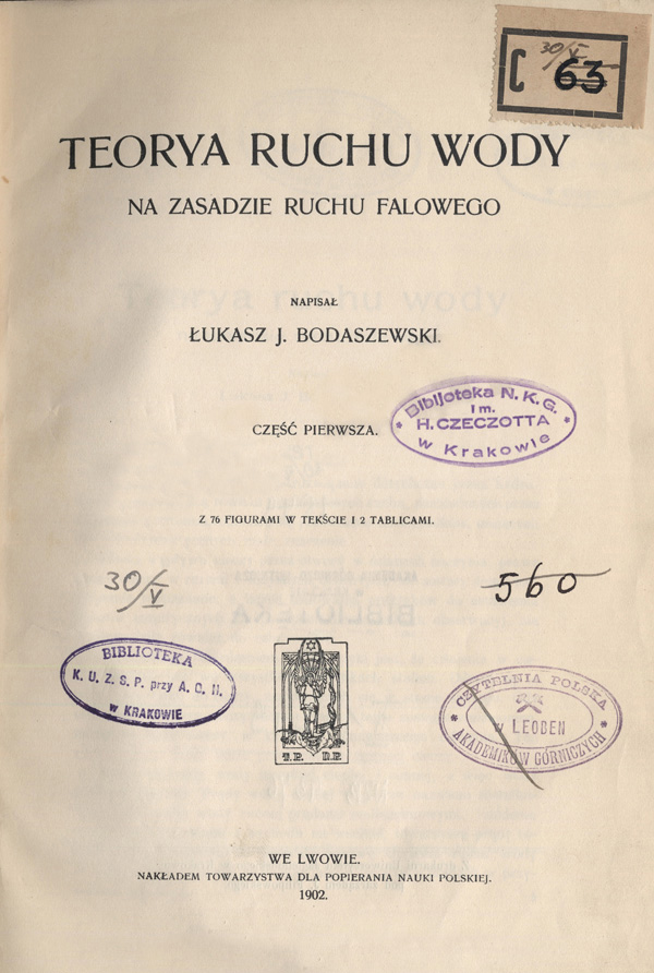 Обкладинка праці «Teorya ruchu wody na zasadzie ruchu falowego» Лукаша Бодашевського. Колекція бібліотеки Гірничо-металургійної академії у Кракові.